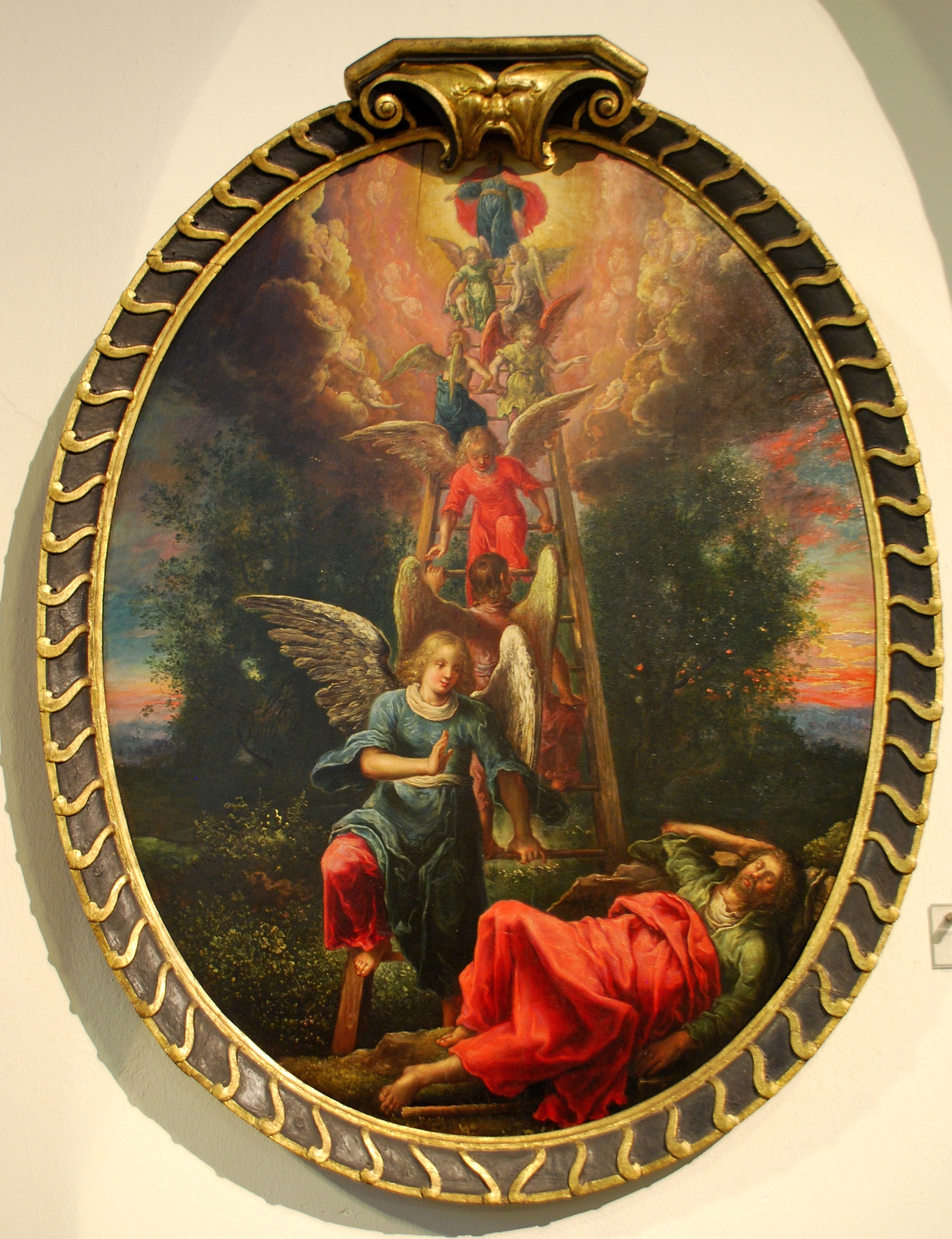 Gemälde Jakobsleiter in der Hauptkirche St. Petri, Hamburg